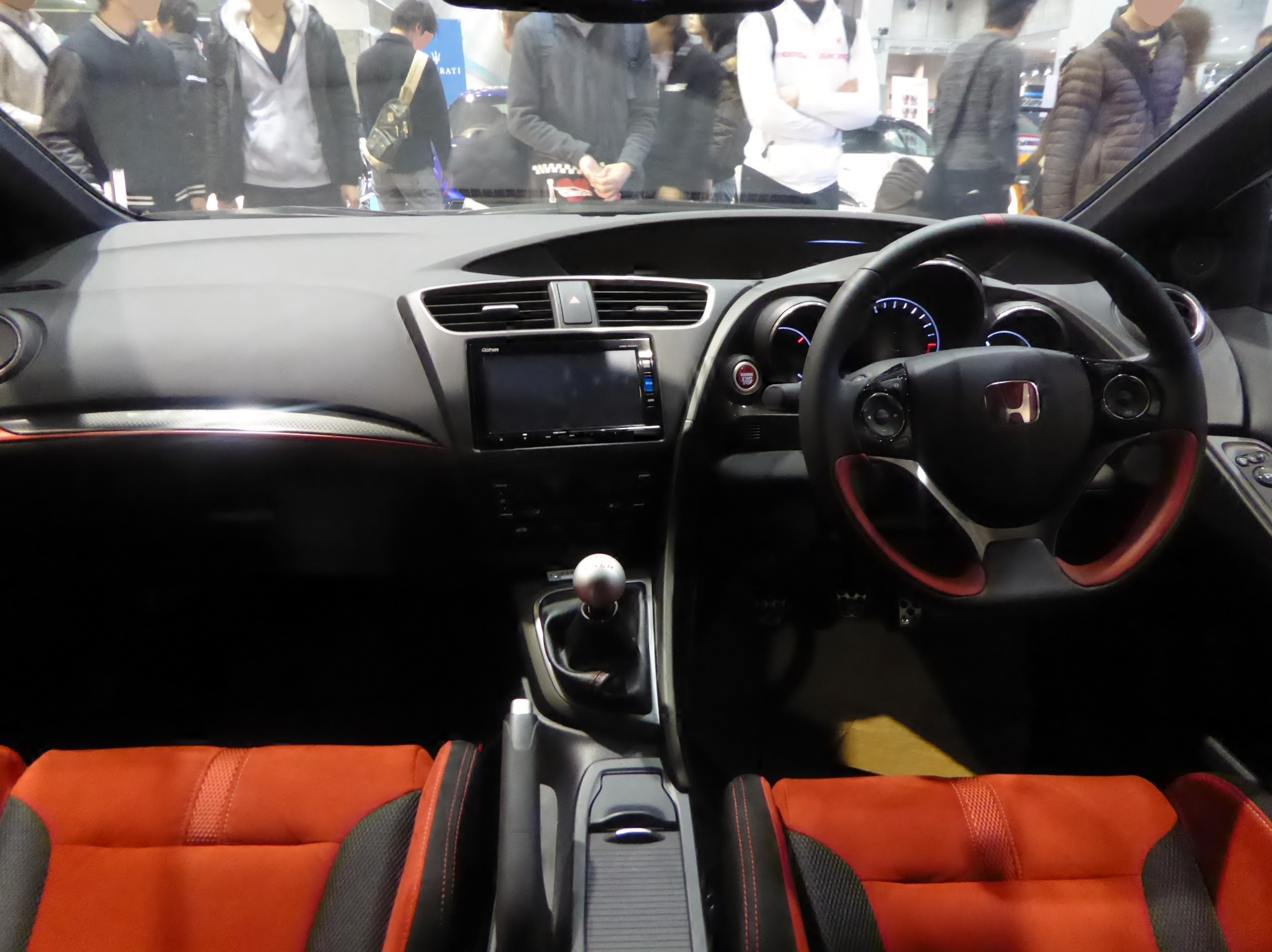 大阪オートメッセ2016においてDBA-FK2型ホンダ・シビックタイプRを撮影。